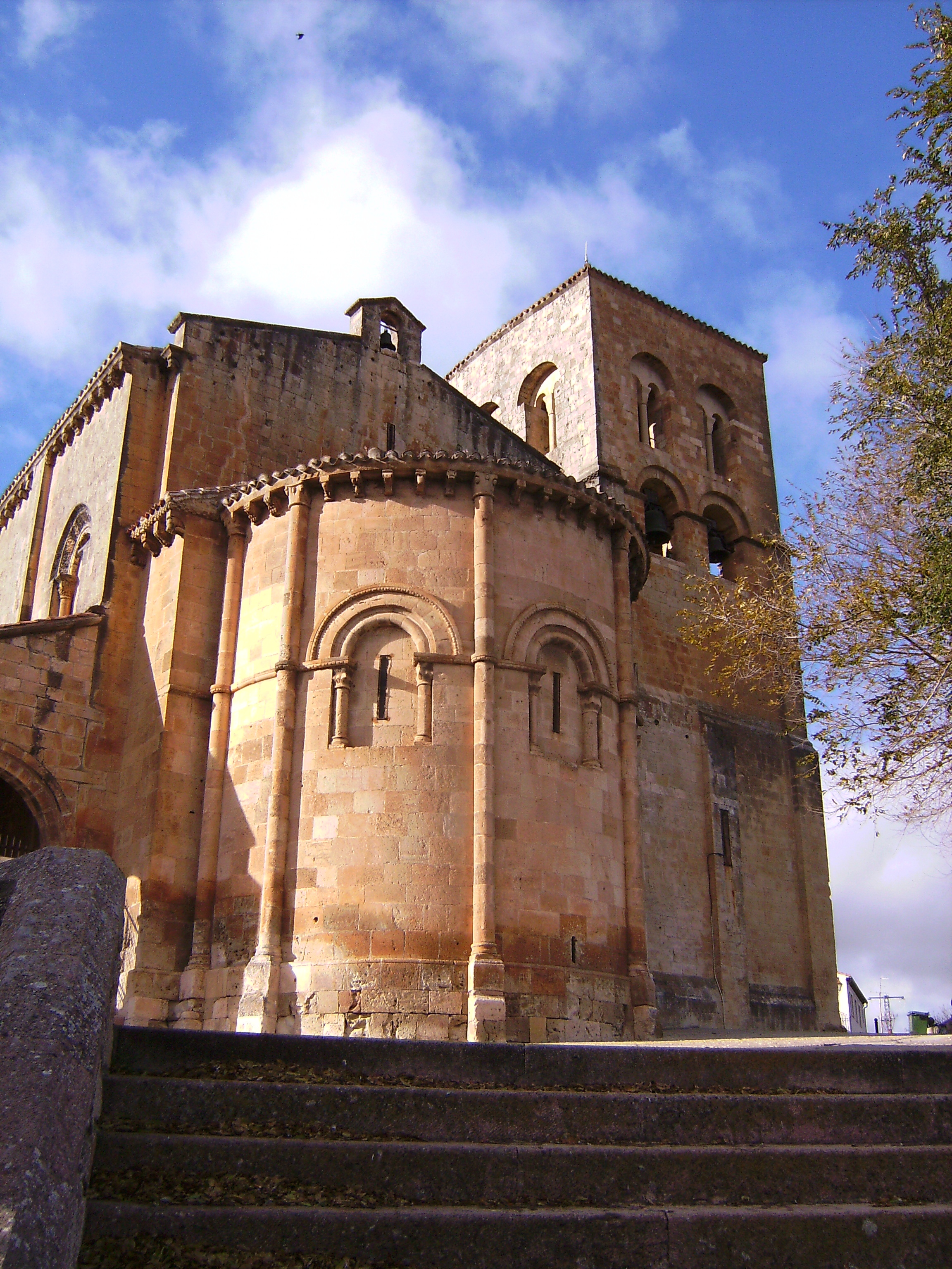 Sepulveda - Iglesia de El Salvador (Exterior)